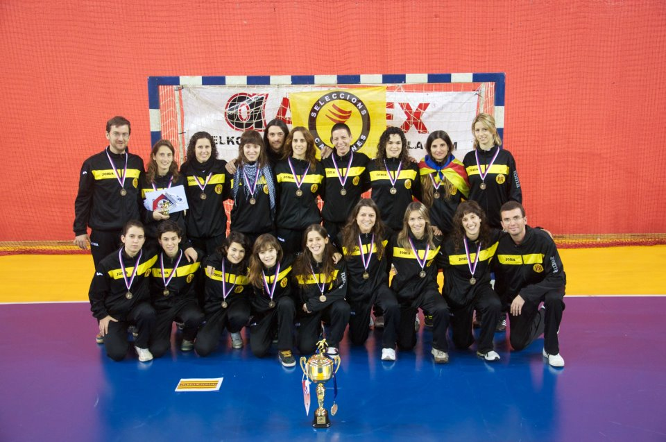 Catalunya Absoluta Femenina Futsal (Praga 2011)